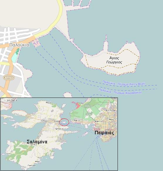 Άγιος Γεώργιος Σαλαμίνας This map may be incomplete, and may contain errors. Don't rely solely on it for navigation.